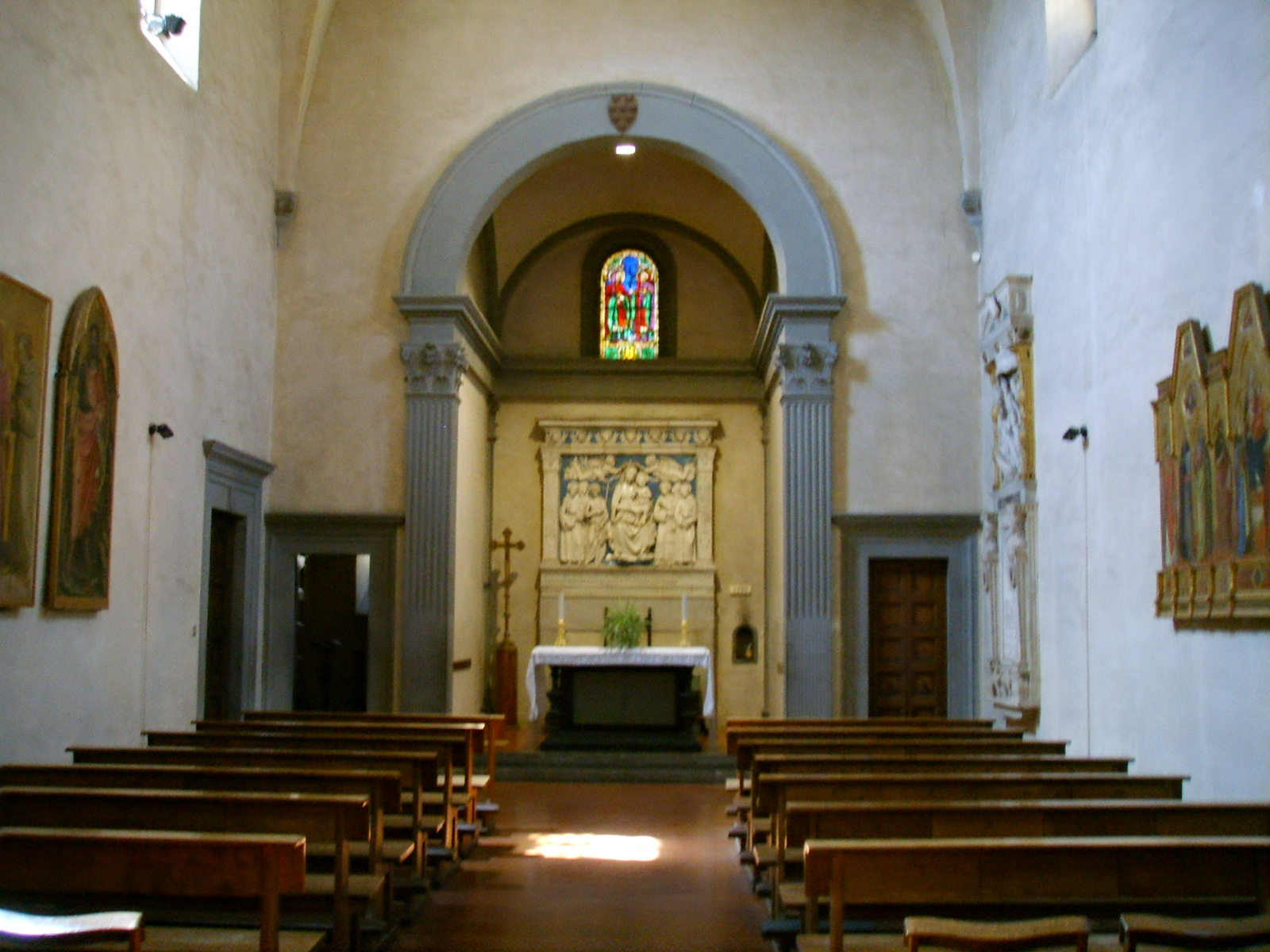 Basilica di Santa Croce di Firenze, medici chapel by Michelozzo, inside, in Florence, Italy